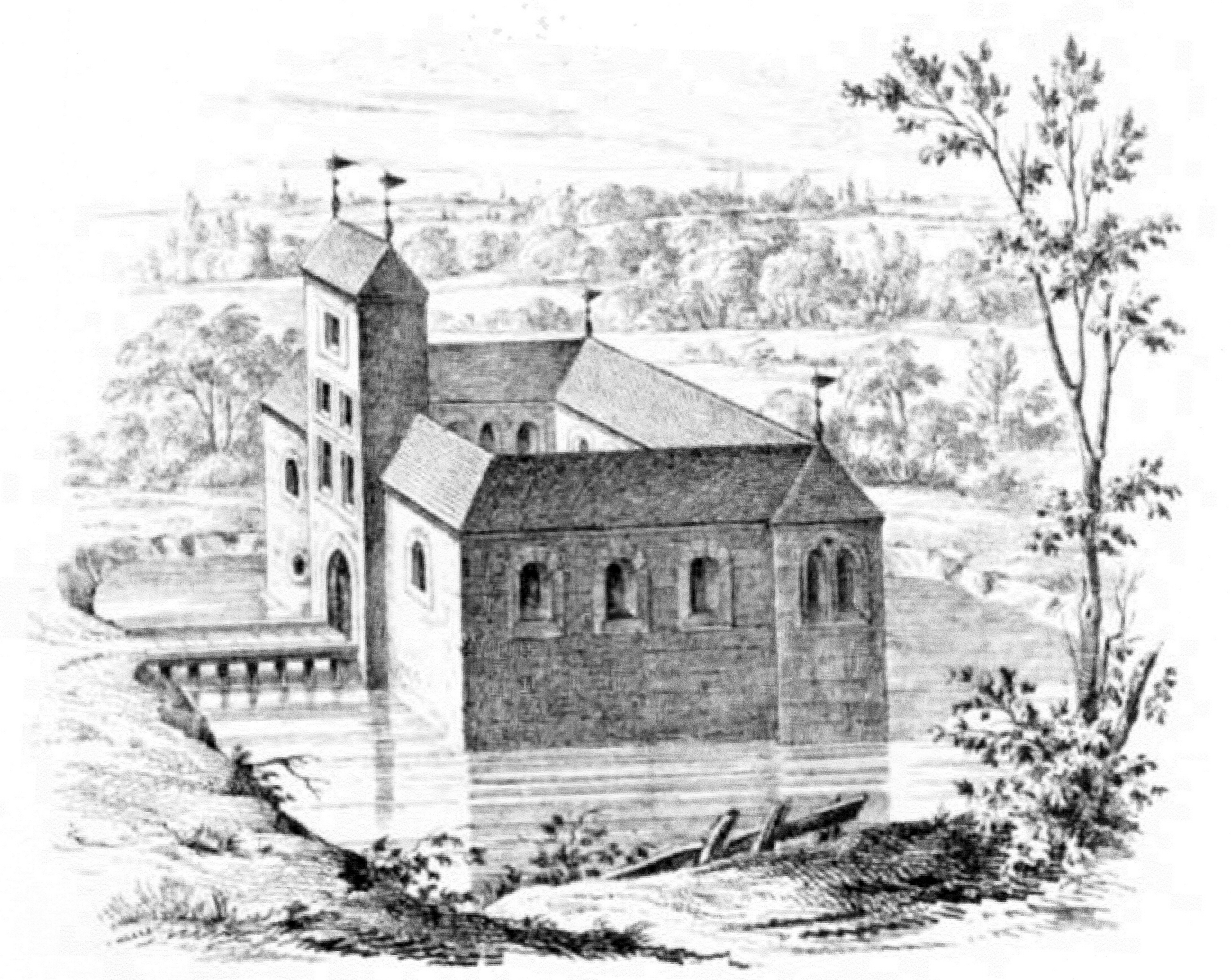 Schloss Bülk vor 1616, Zeichnung von Köhler und Roisternitz 1862